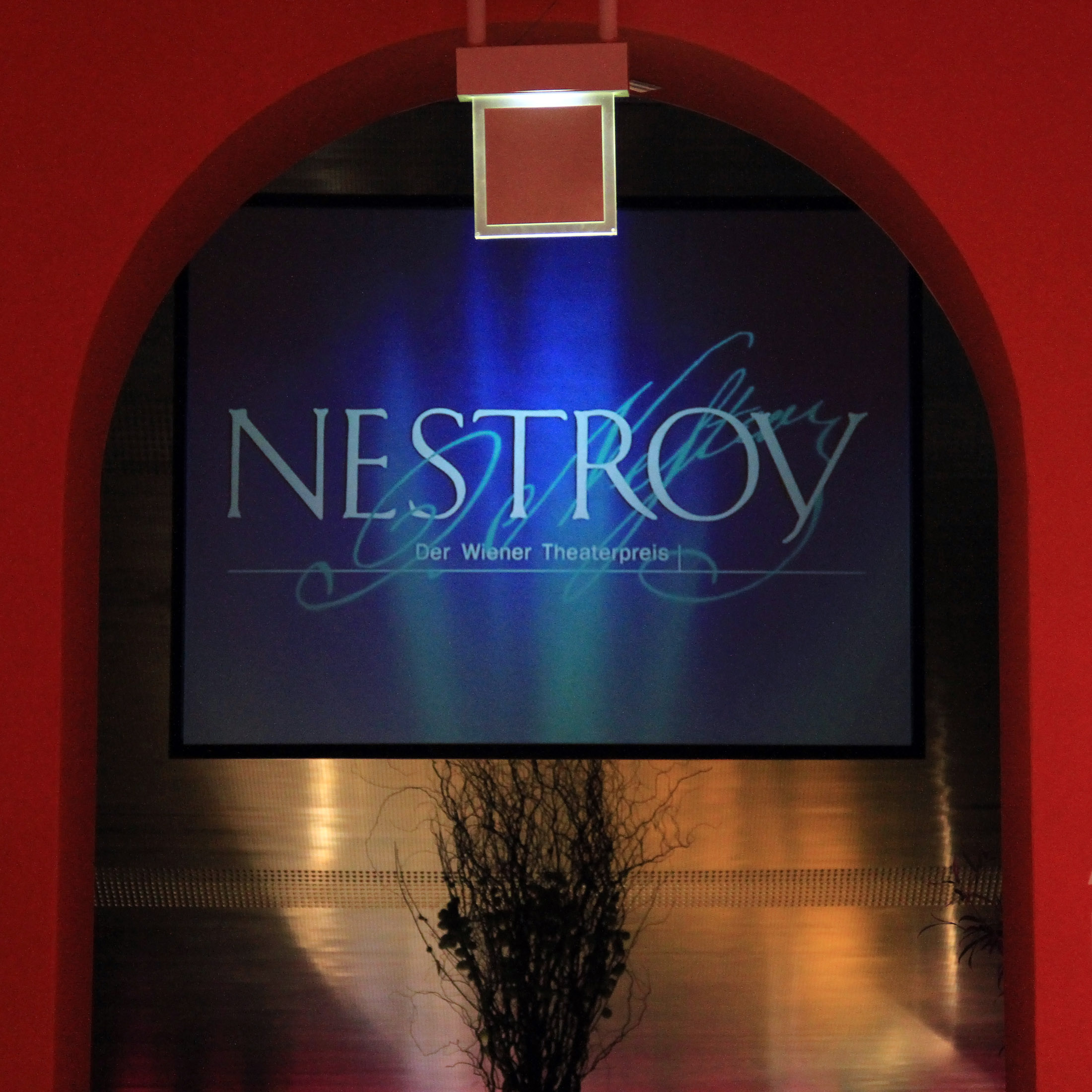 Nestroy-Theaterpreis 2012 im MuseumsQuartier in Wien.